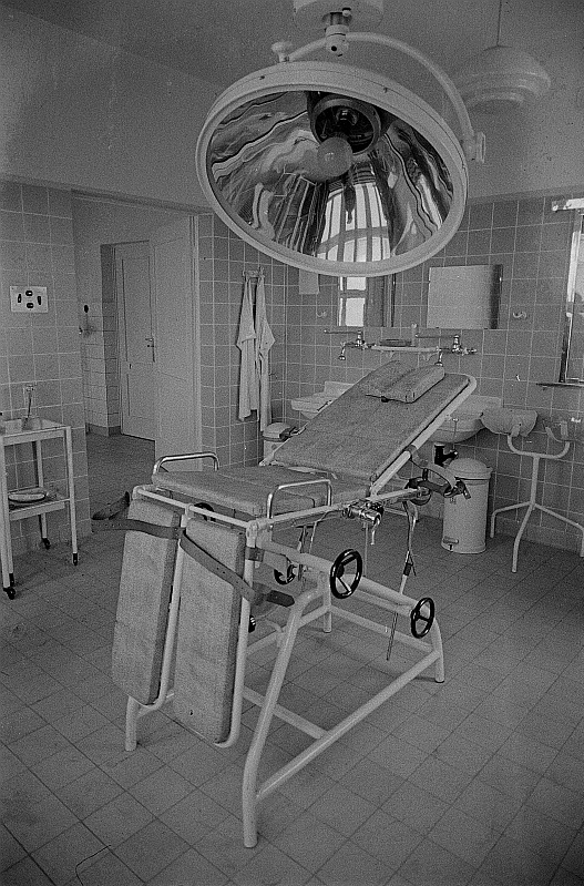 Original image description from the Deutsche FotothekAseptischer Operationssaal in der Poliklinik des VEB Leipziger Eisen- und Stahlwerke